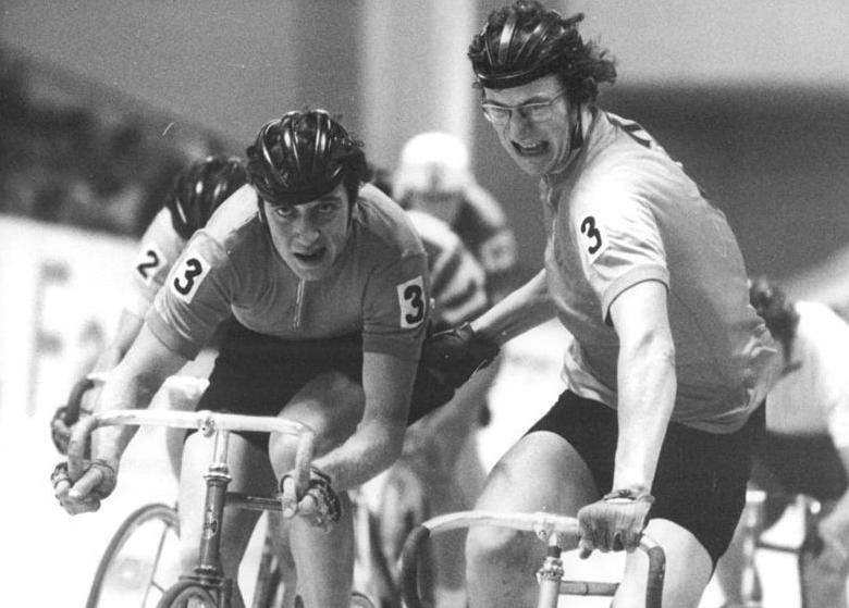 Andreas Neuer, Volker Winkler ADN-ZB Mittelstädt 7.1.77-str-Berlin: 6 Tage um den Preis der Junge Welt auf der Winterbahn - Andreas Neuer (SC Karl-Marx-Stadt-r.) und Volker Winkler (SC Cottbus) konnten am 6.1. die e. Etappe der 6 TAge klar für sich gestalten. Mit acht Punkten Vorsprung gewannen sie ein 450-Runden-Rennen und übernahmen mit 58 Punkten die Führung in der Gesamtwertung.